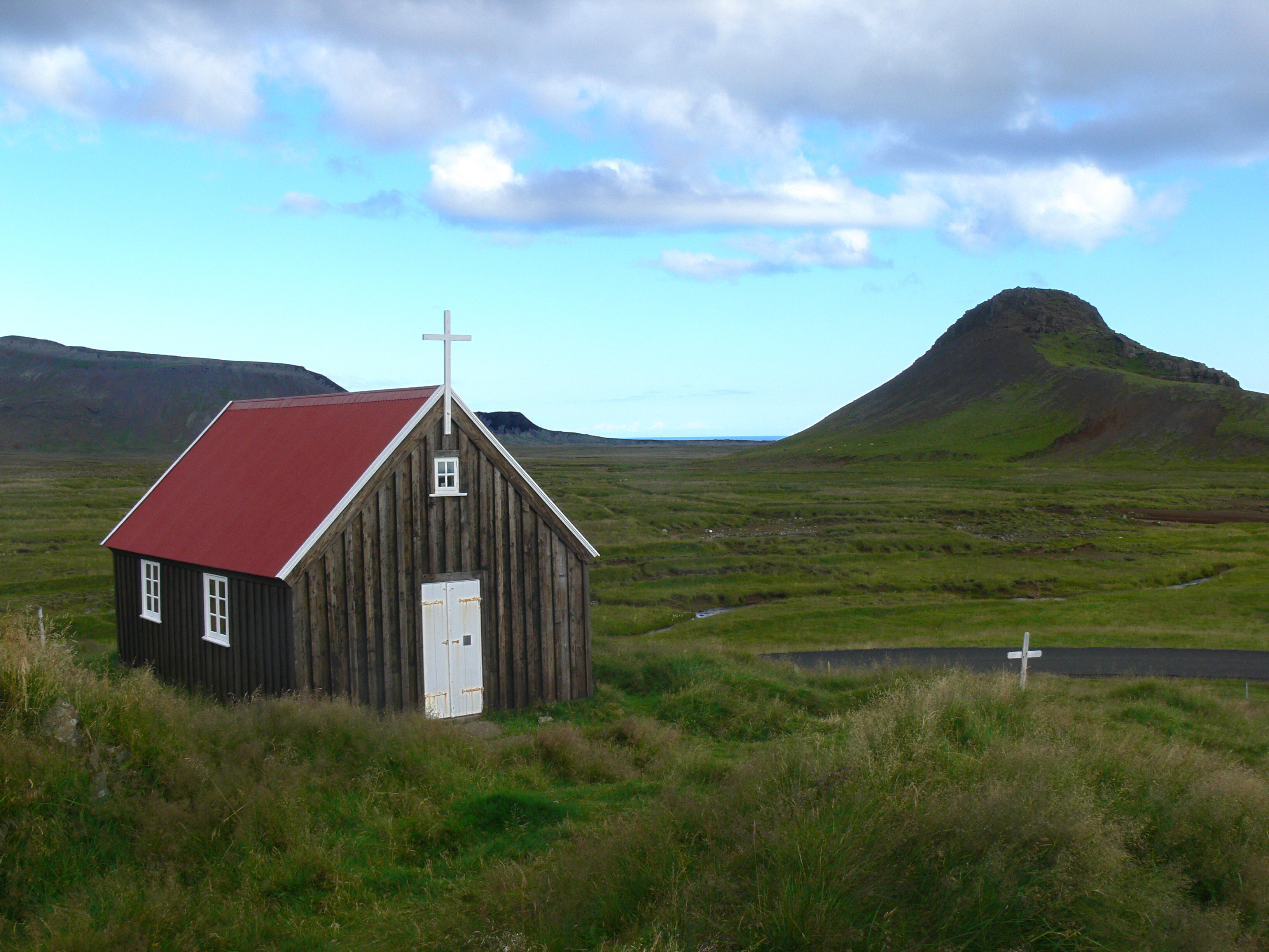 Krýsuvíkurkikja, 1857 erbaut und steht unter der Obhut des Nationalmuseums.